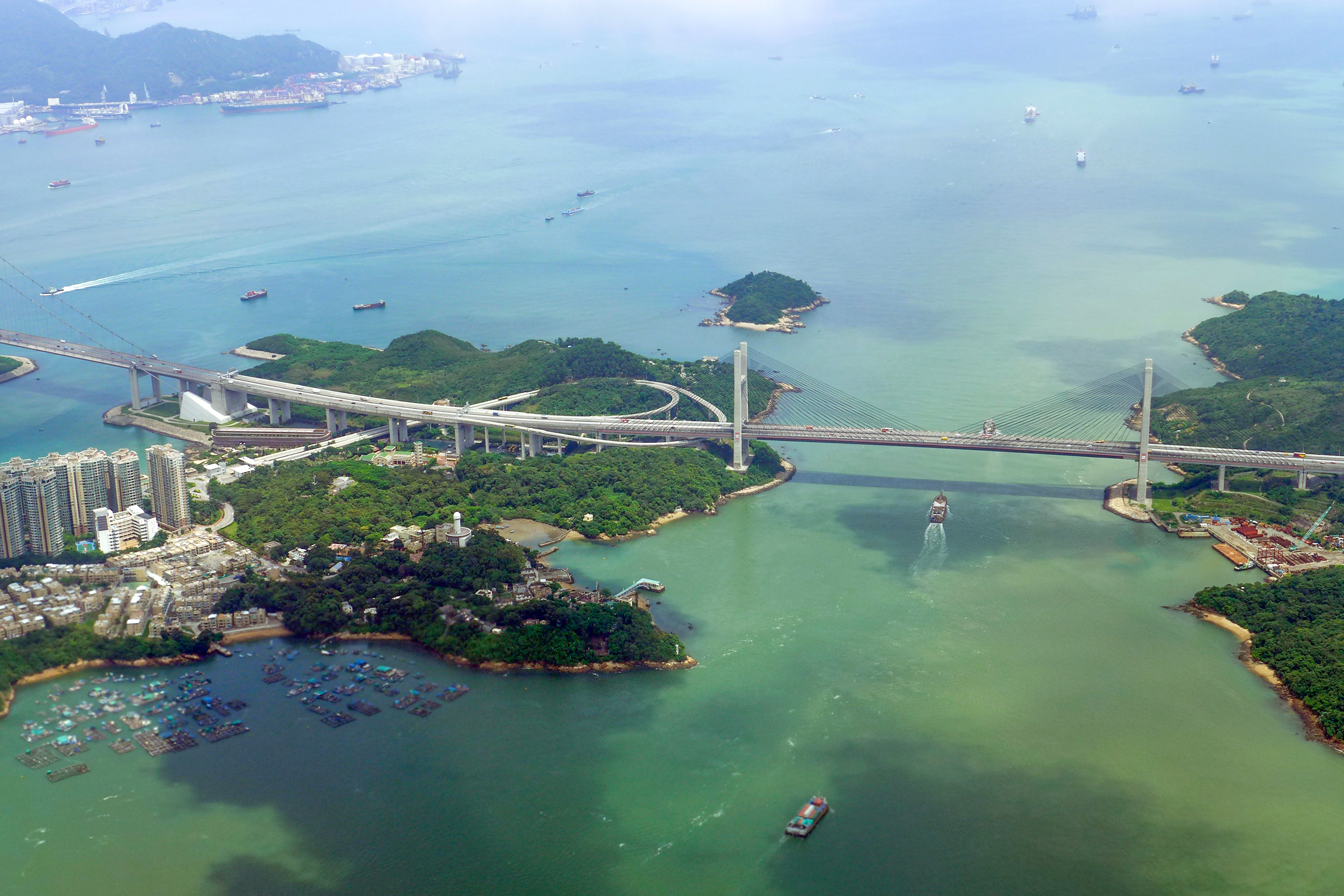 Kap Shui Mun